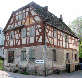 das ehemalige Gasthaus zum Anker in Niedernhausen